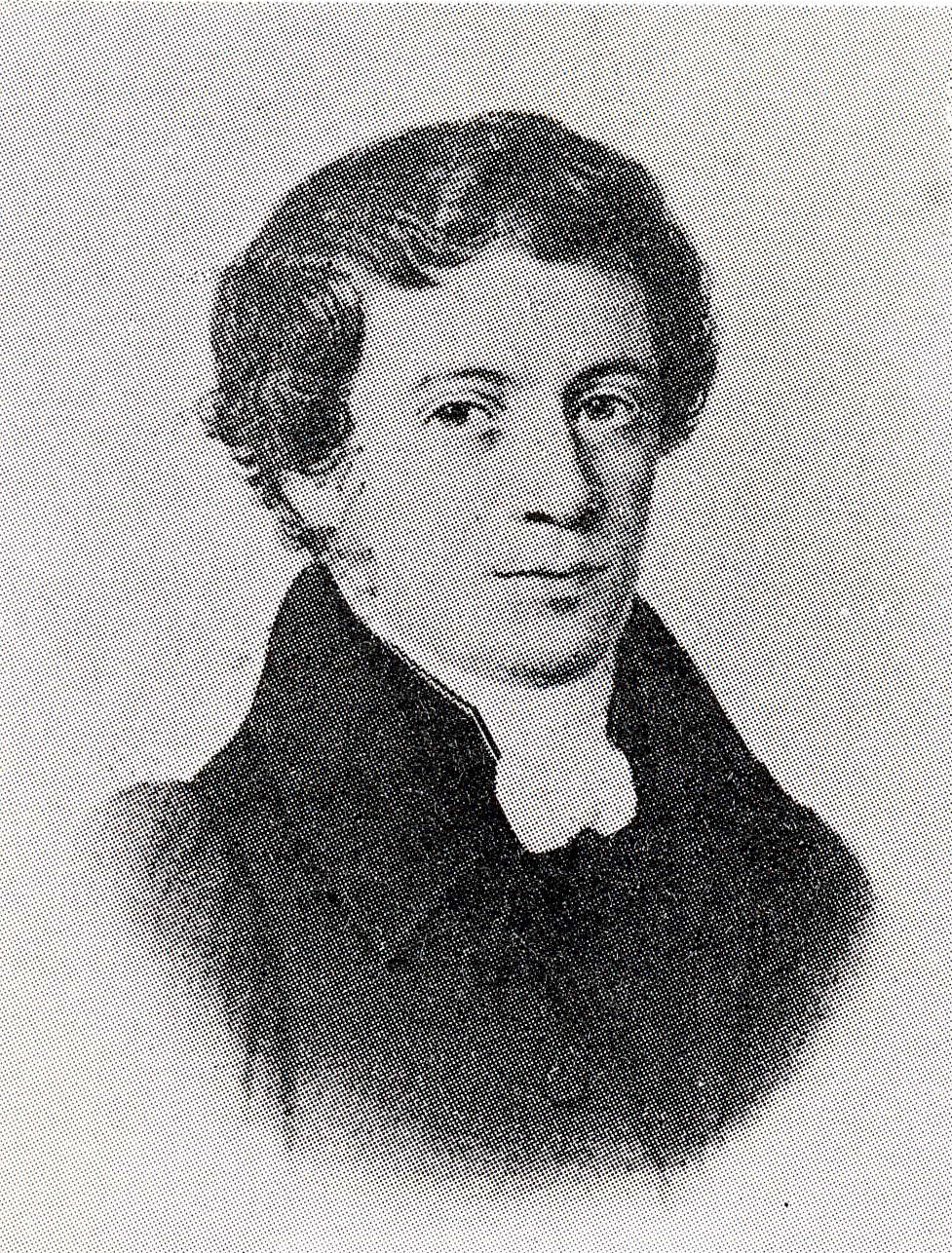 Professori Axel Gabriel Sjöström (1794–1846).